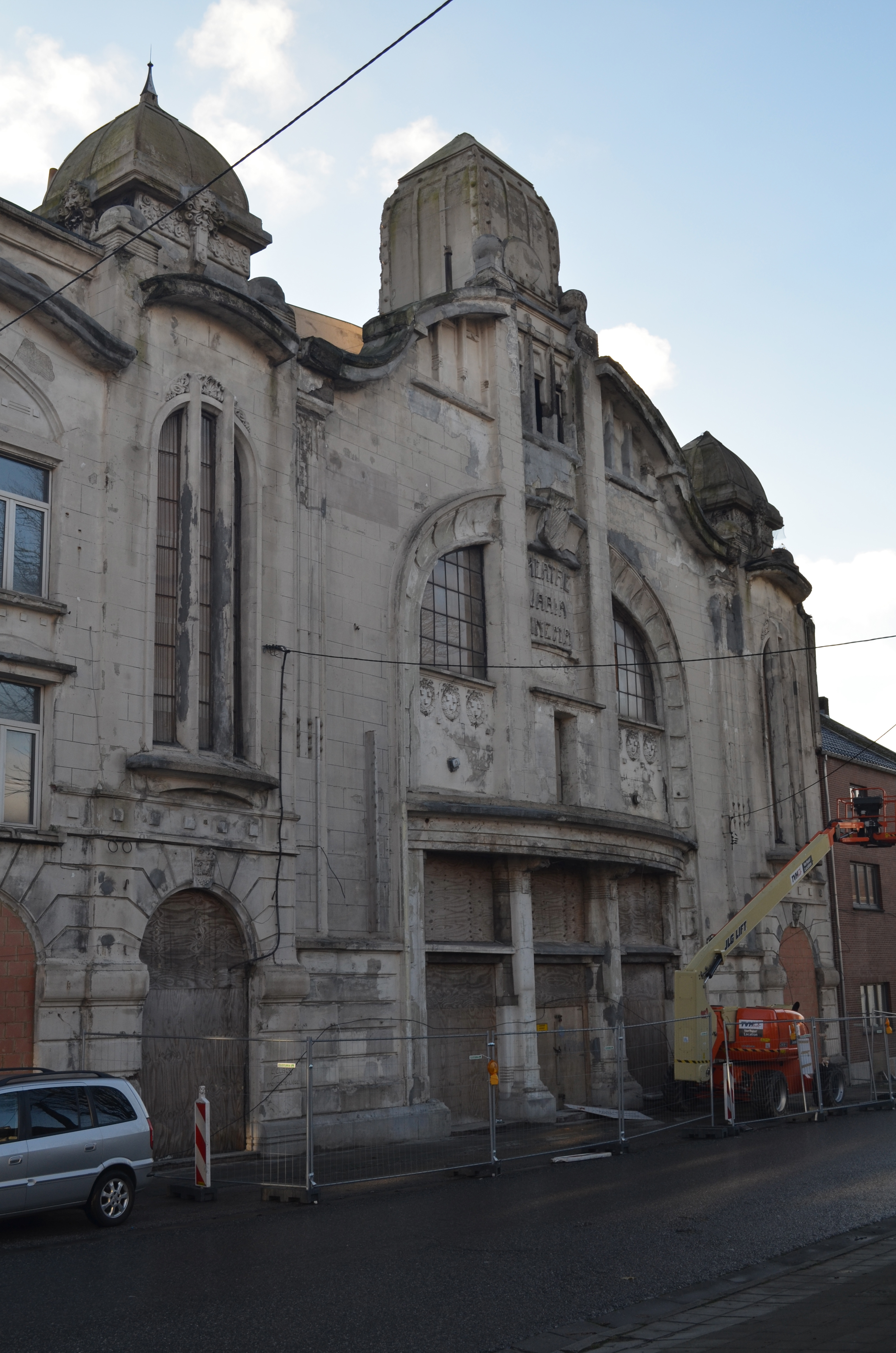 Cinéma-théâtre le Varia à Jumet - construction 1910.